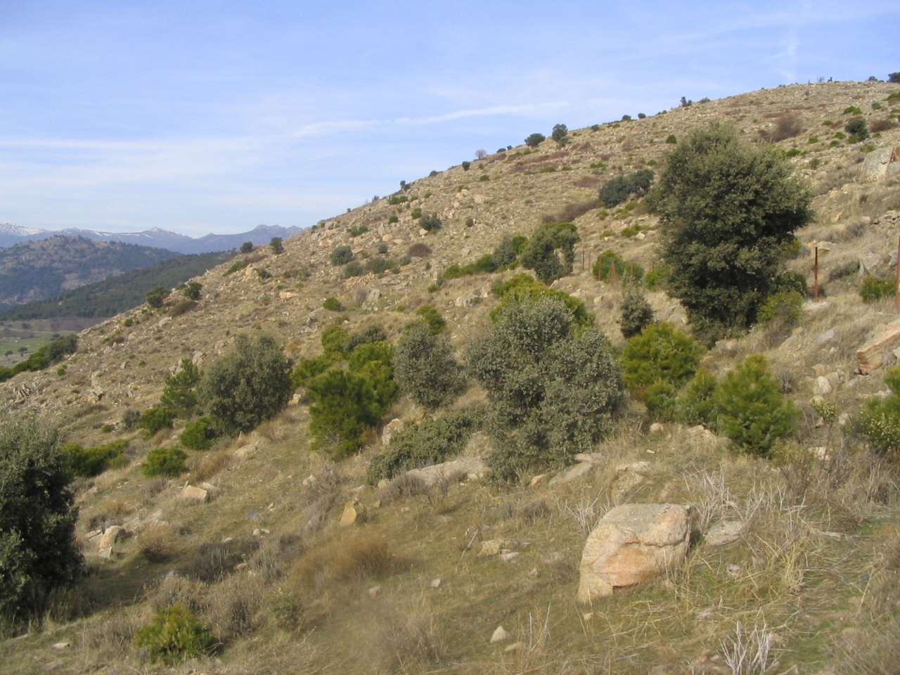 Ladera sur del Cerro Cañal, perteneciente a la Sierra de Guadarrama (España).